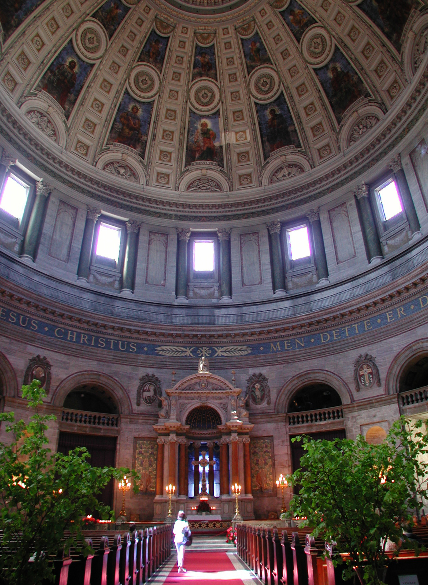 Marmorkirken, Copenhagen, Denmark. Interior.